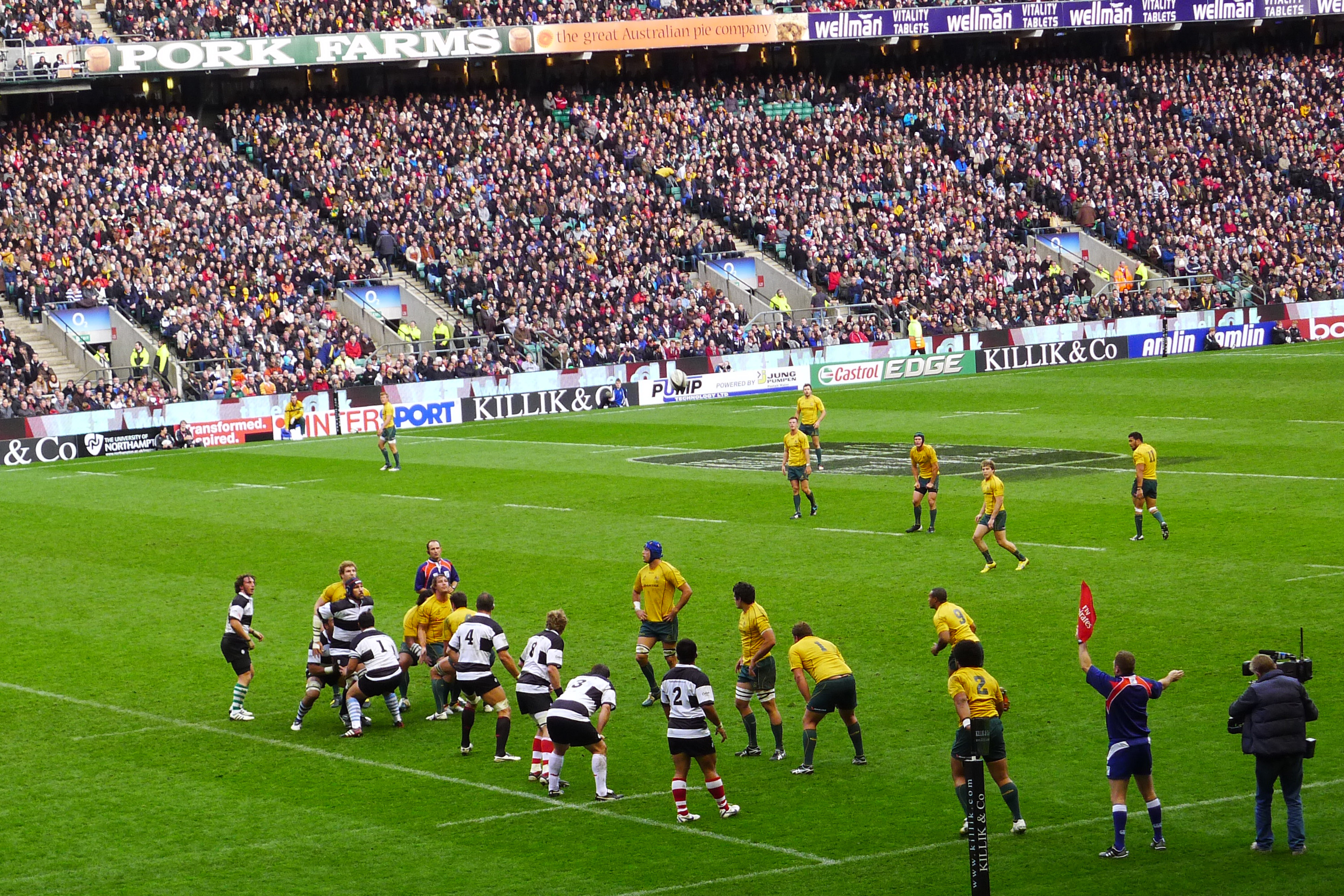 Barbarians vs Australia 2011